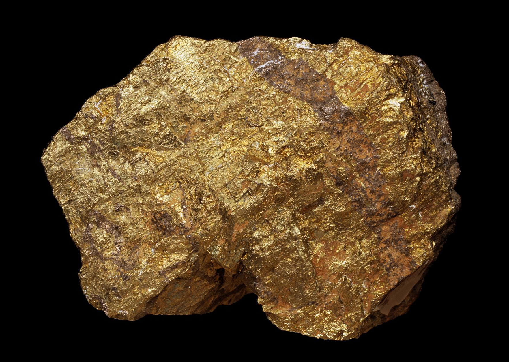 Västerbottens landskapssten, kopparkismalmen, har stor utbredning i Skelleftefältet där den uppträder med andra sulfidmalmer. Malmerna i Skelleftefältet har troligen bildats i en vulkanisk öbåge när stora mängder havsvatten cirkulerat i sprickor i berggrunden, värmts upp av underliggande magma och lakat metaller ur berget. När vattnet sedan strömmat ut på havsbottnen har metallerna fällts ut och bildat en linsformad malmkropp som bäddats in i omgivande sediment för kanske 1900 miljoner år sedan. Den genom tiderna mest kända fyndigheten är Boliden, där också mycket guld funnits, särskilt i arsenikkis.